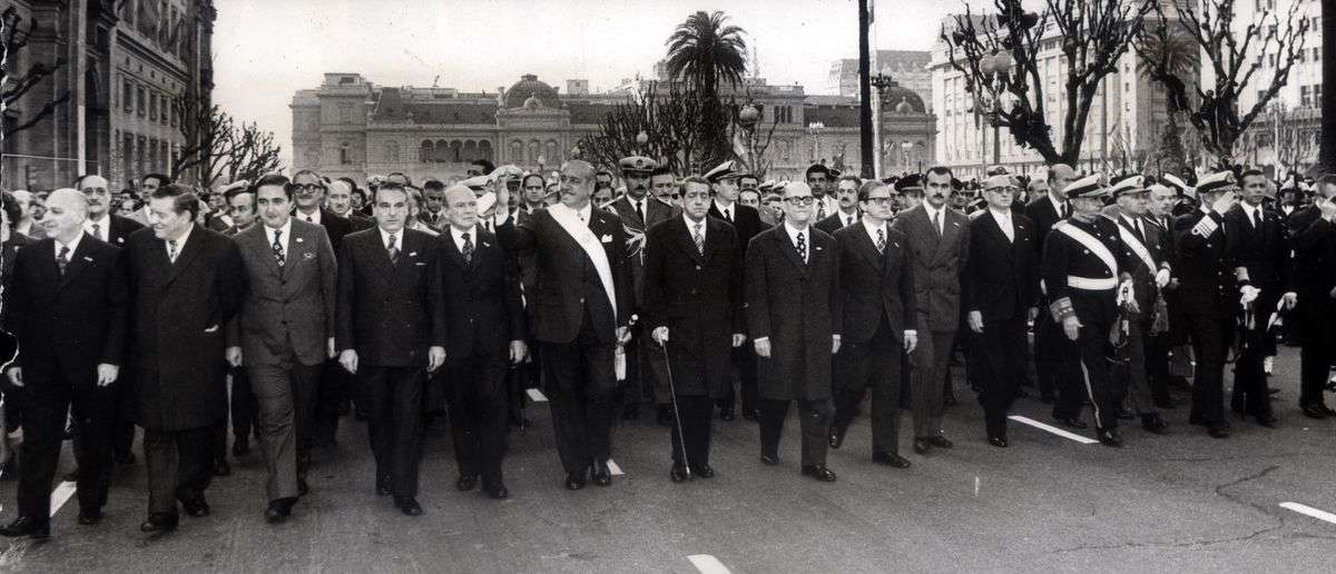 El Presidente Héctor Campora recorre la Plaza de Mayo junto a su Gabinete de Ministros.